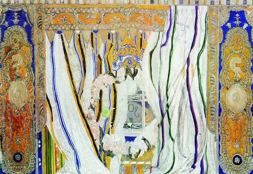 Эскиз занавеса к опере П.И. Чайковского "Евгений Онегин". 1925 Эскиз Государственный центральный театральный музей им. А.А.Бахрушина